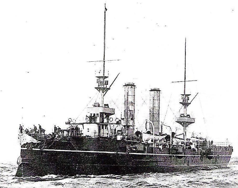 Der chilenische Kreuzer Ministero Zenteno